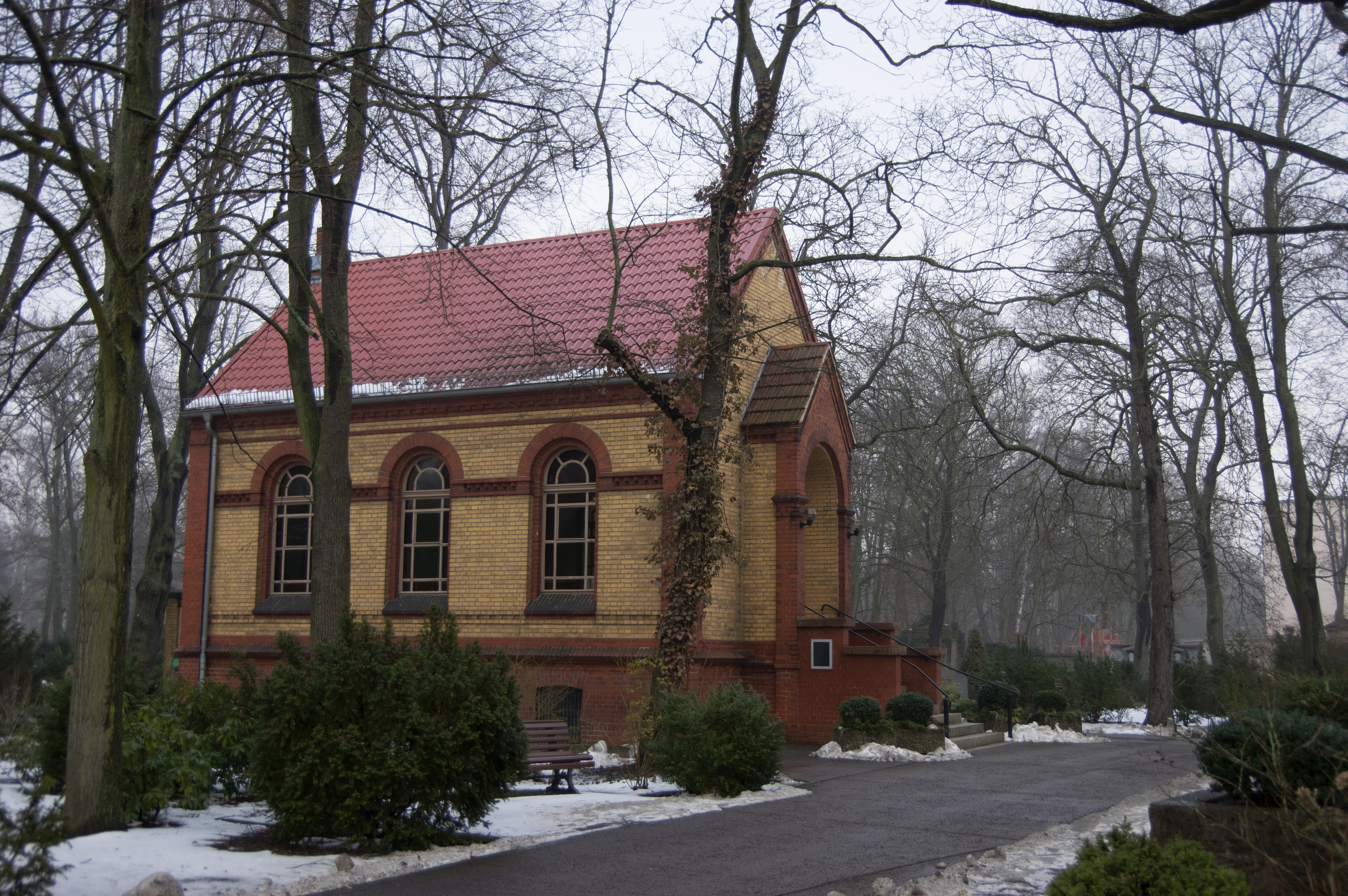 Berlin-Adlershof. Der Friedhof Adlershof befindet sich in dem Bezirk Treptow-Köpenick.